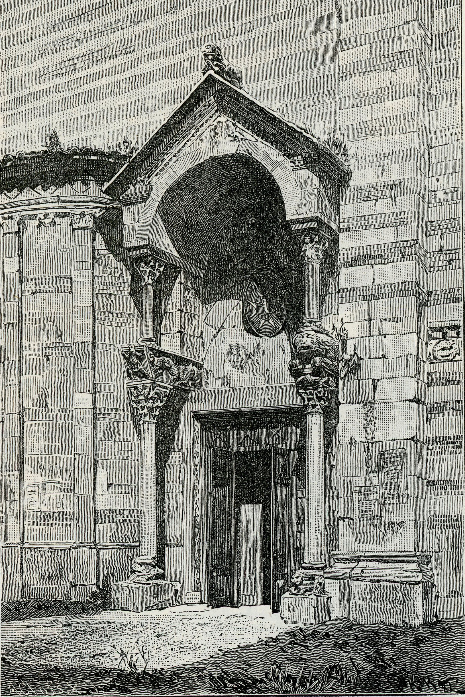 Verona: porta laterale all’abside del Duomo (xilografia).